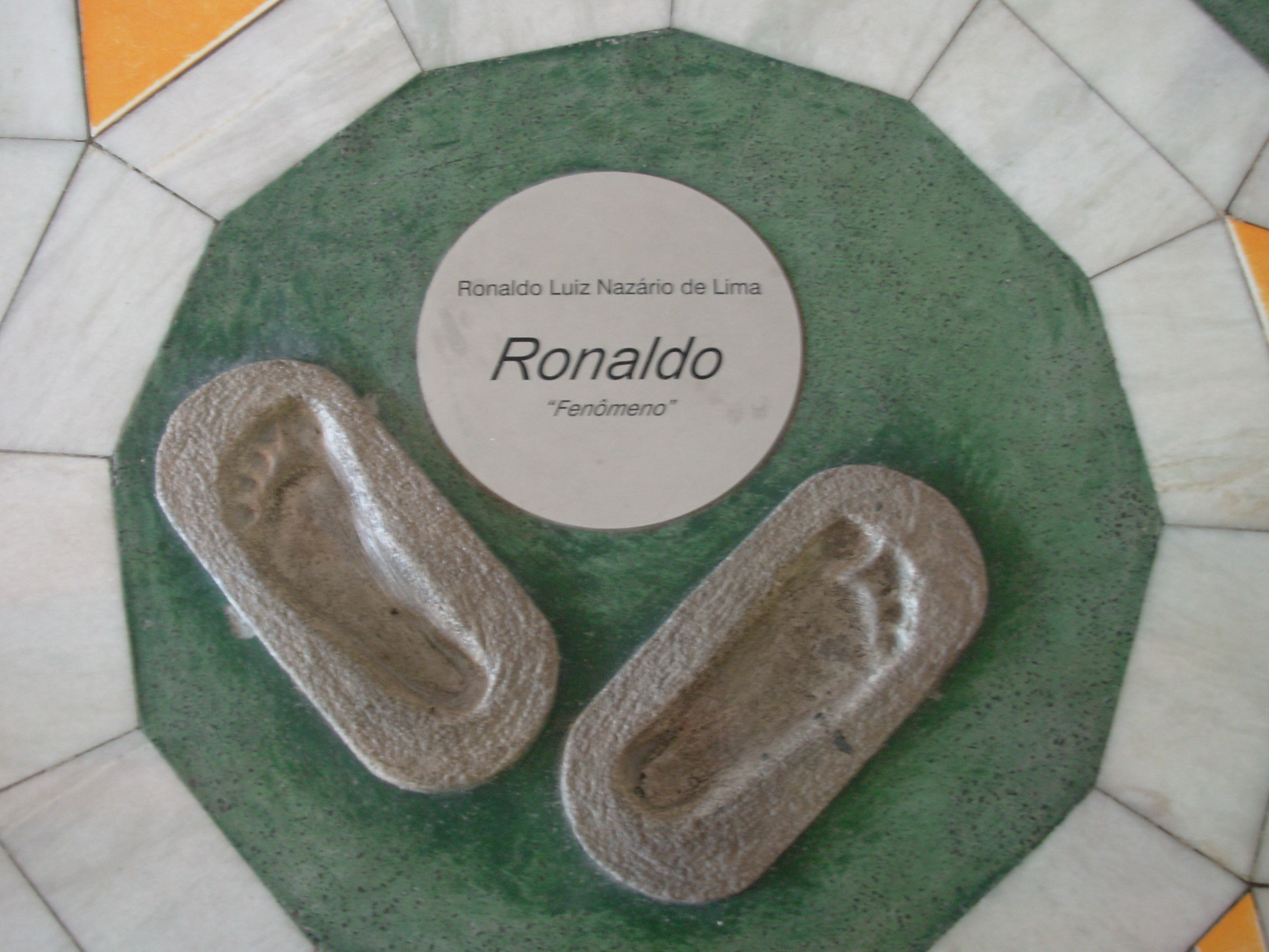 Odcisk stóp Ronaldo na stadionie Maracana w Rio de Janeirio